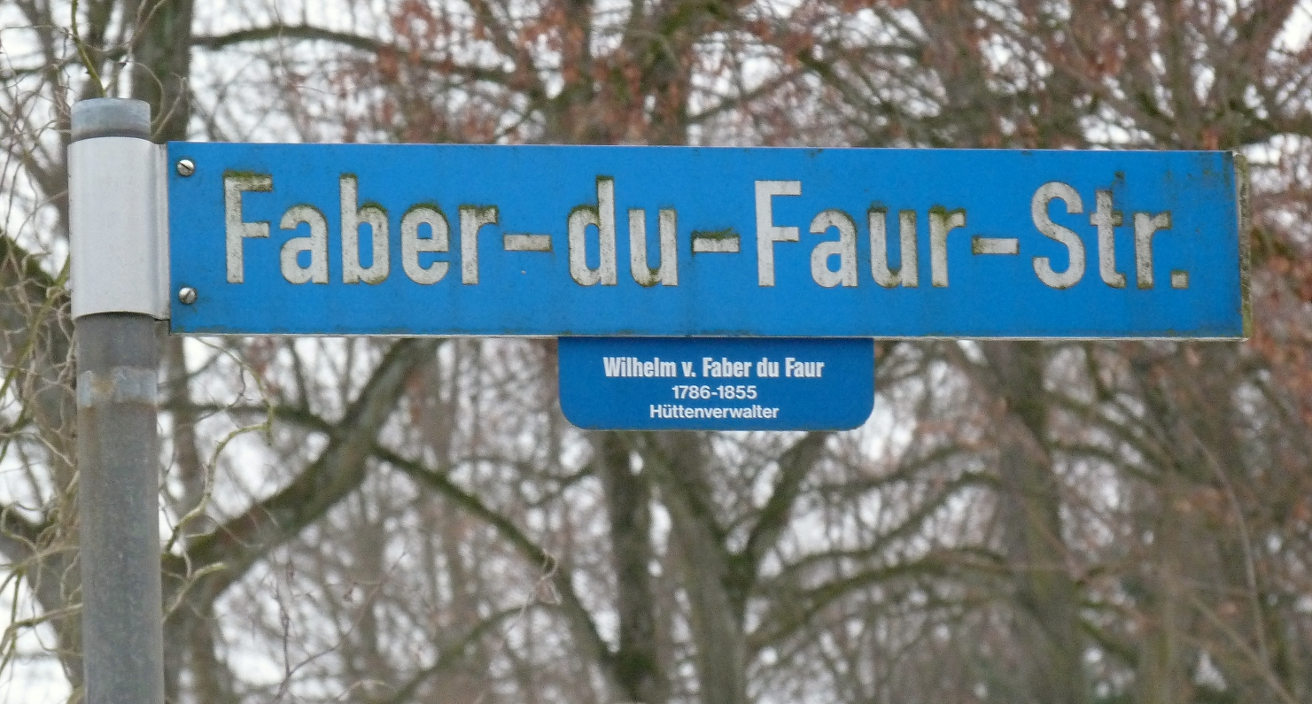 Nach Wilhelm von Faber du Faur benannte Straße in Aalen